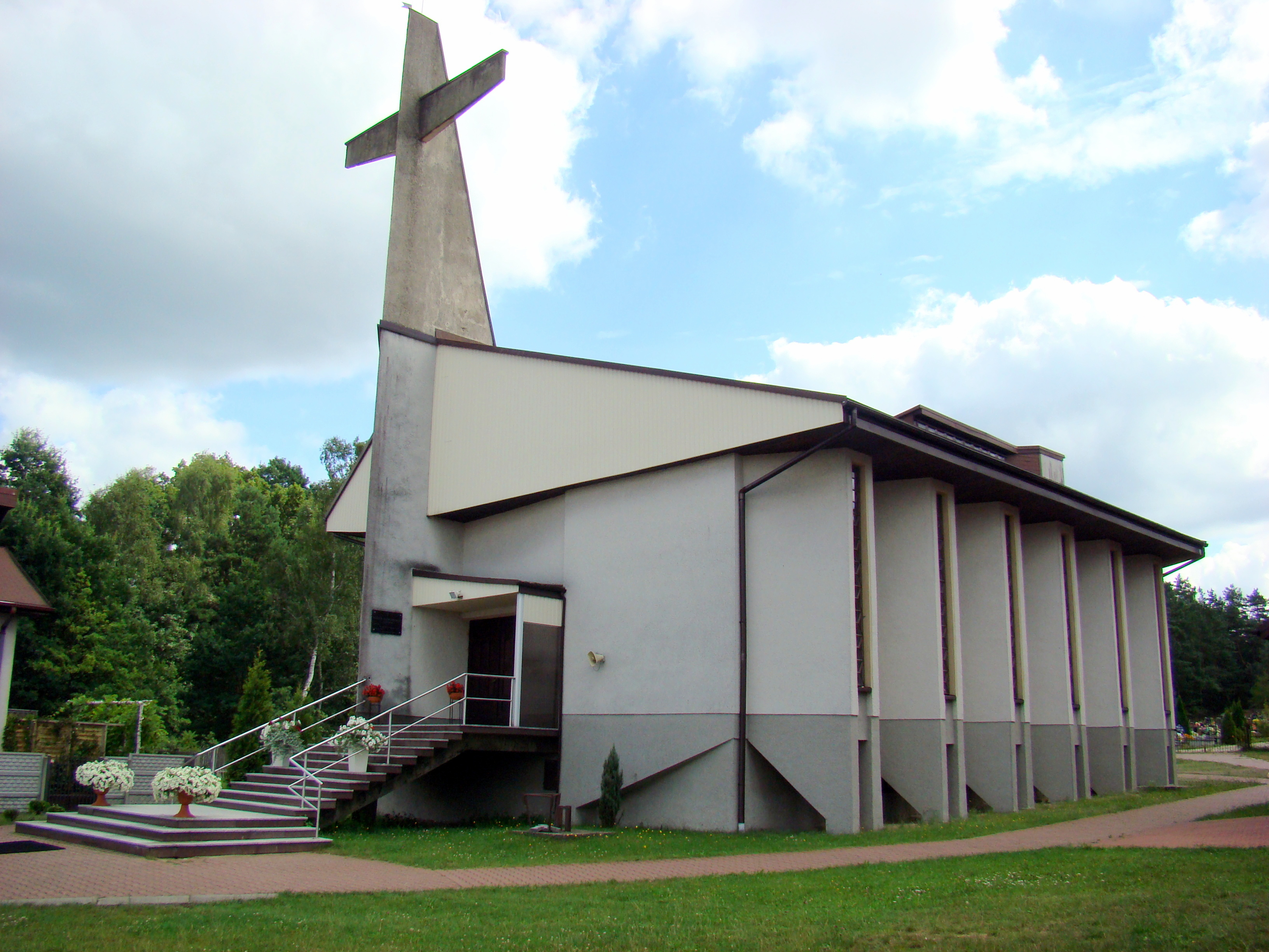 Kościół Świętych Apostołów Piotra i Pawła w Nieradzie, budowę rozpoczęto w 1981, poświęcono w 1982, uroczyście konsekrowano w 2005 roku.